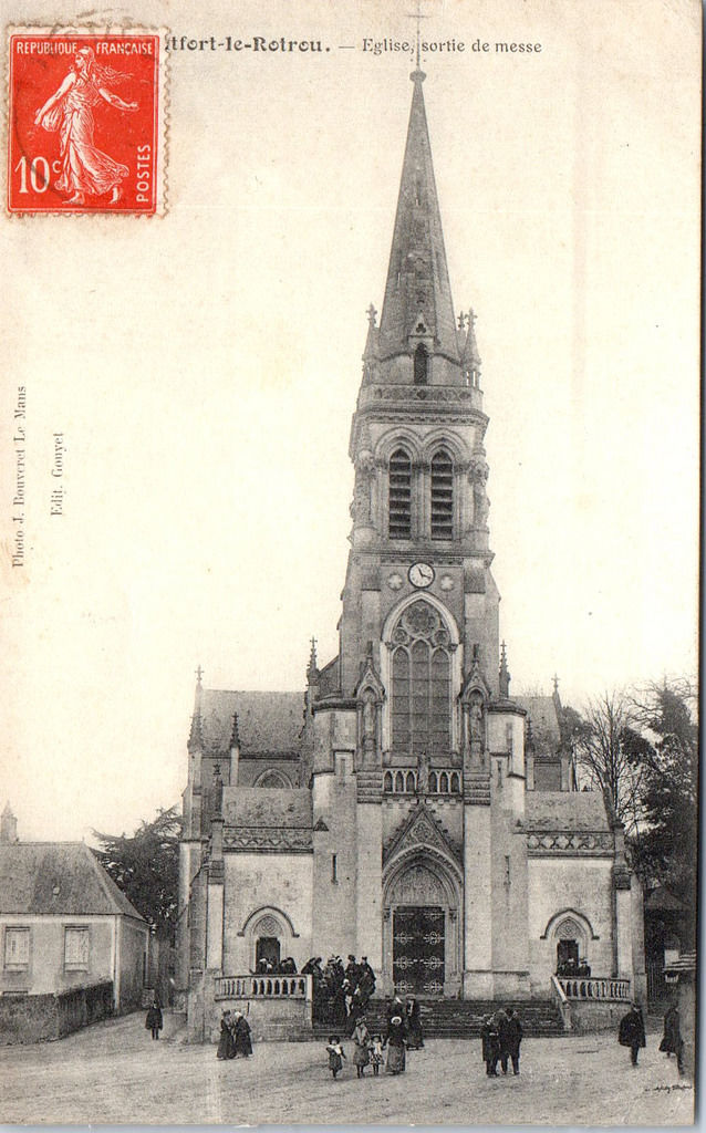 Vue de l'église Notre-Dame de Monfort-le-Rotrou vers 1910.